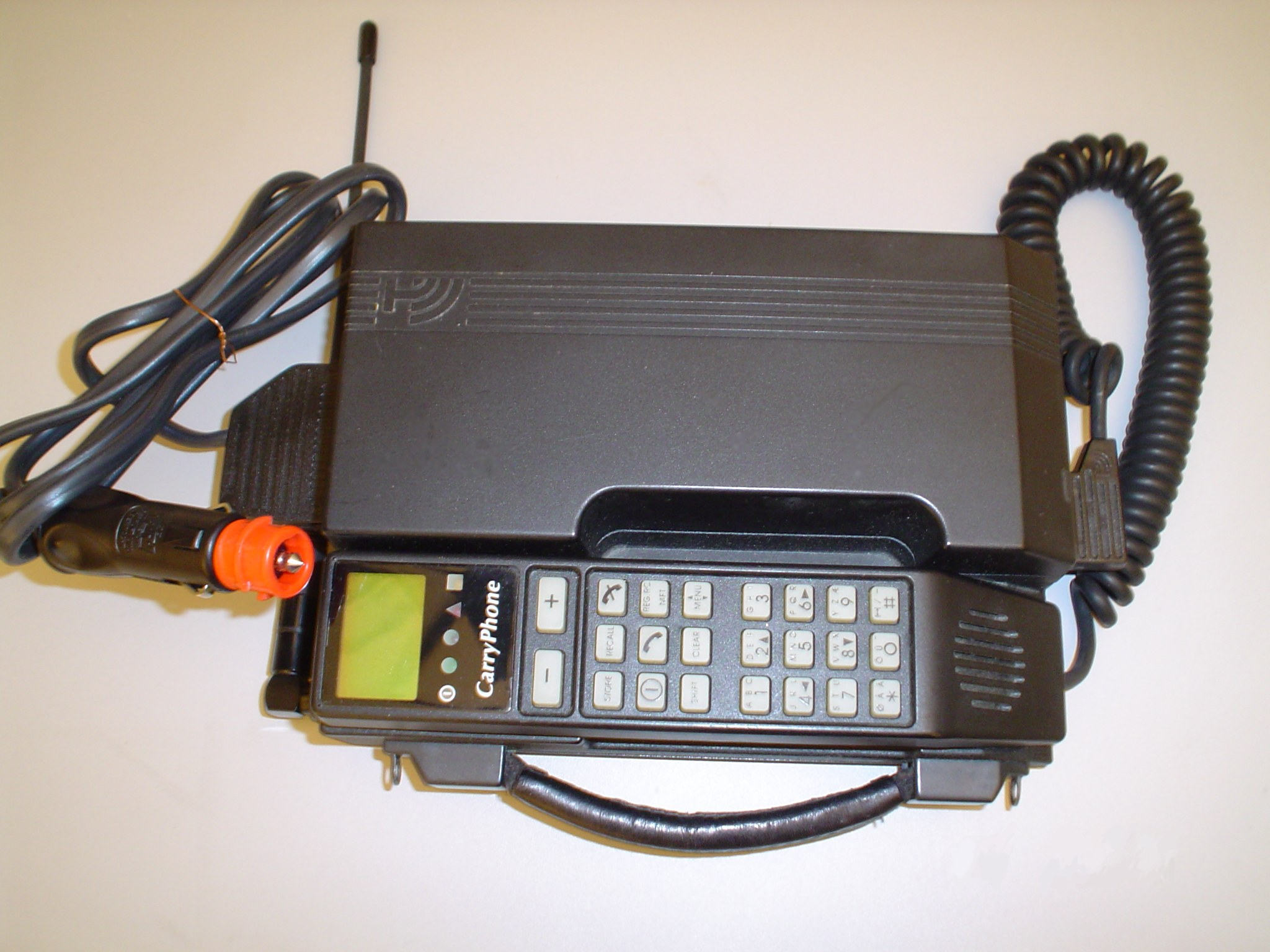 Malnova poŝtelefono por ŝoforoj